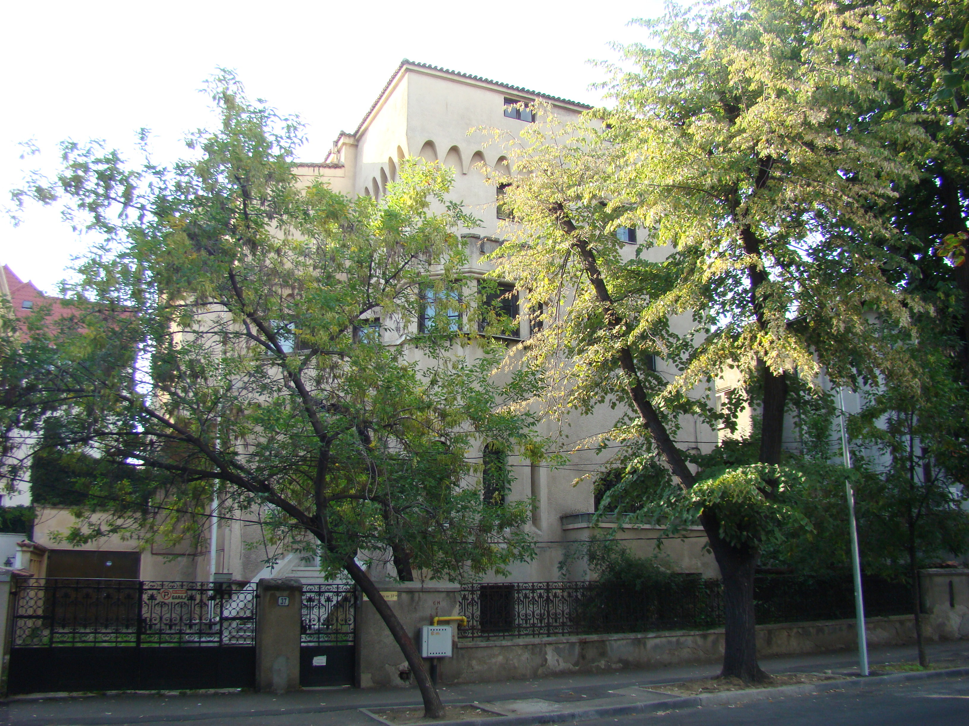 Clădire monument istoric, str. Paris, nr 37